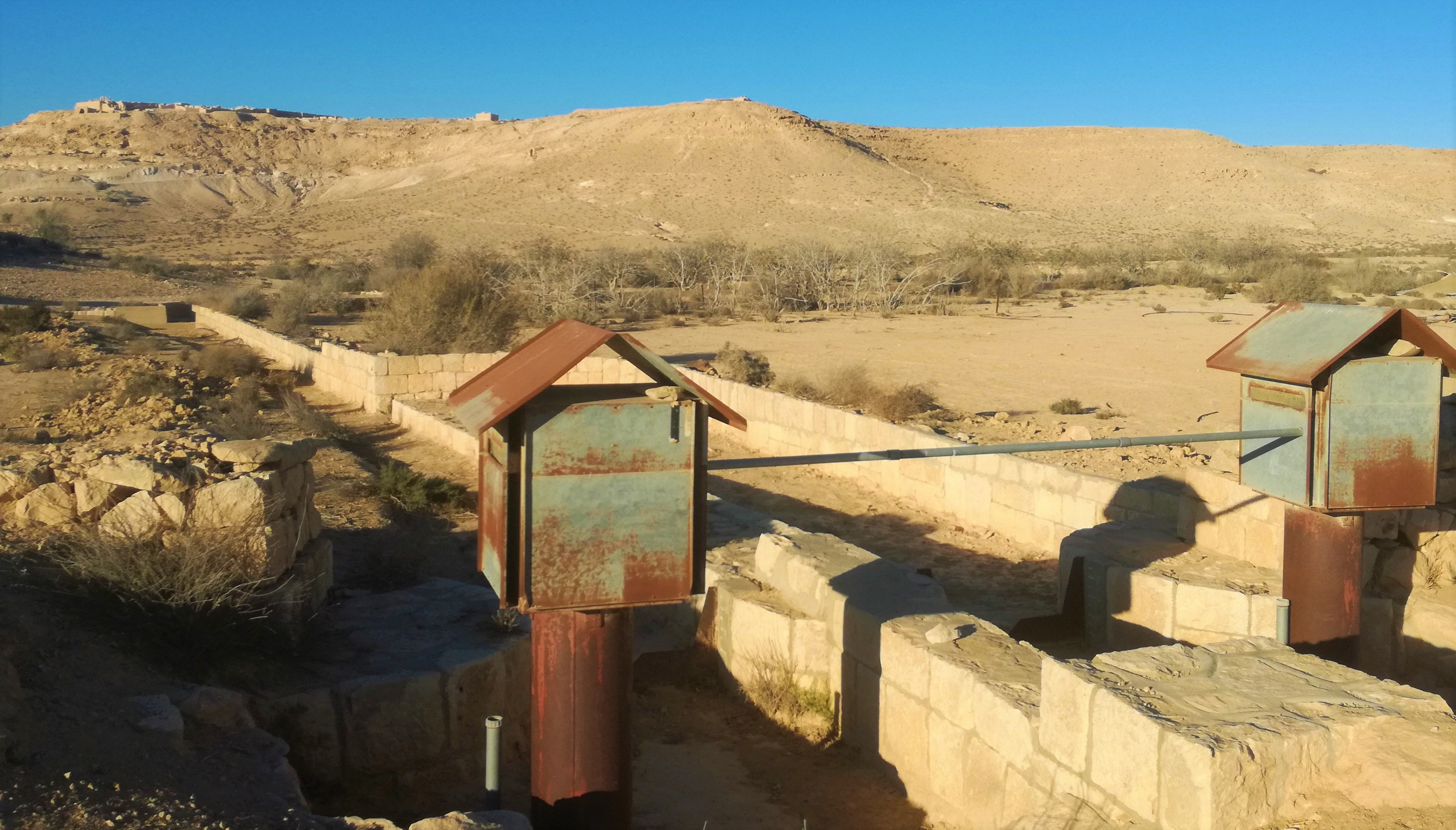 מערכת המים של החווה וברקע העיר עבדת